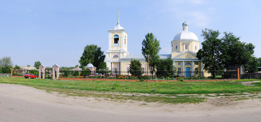 Kirche zu Christi Himmelfahrt in Arkadak, Oblast Saratow, erbaut 1822.